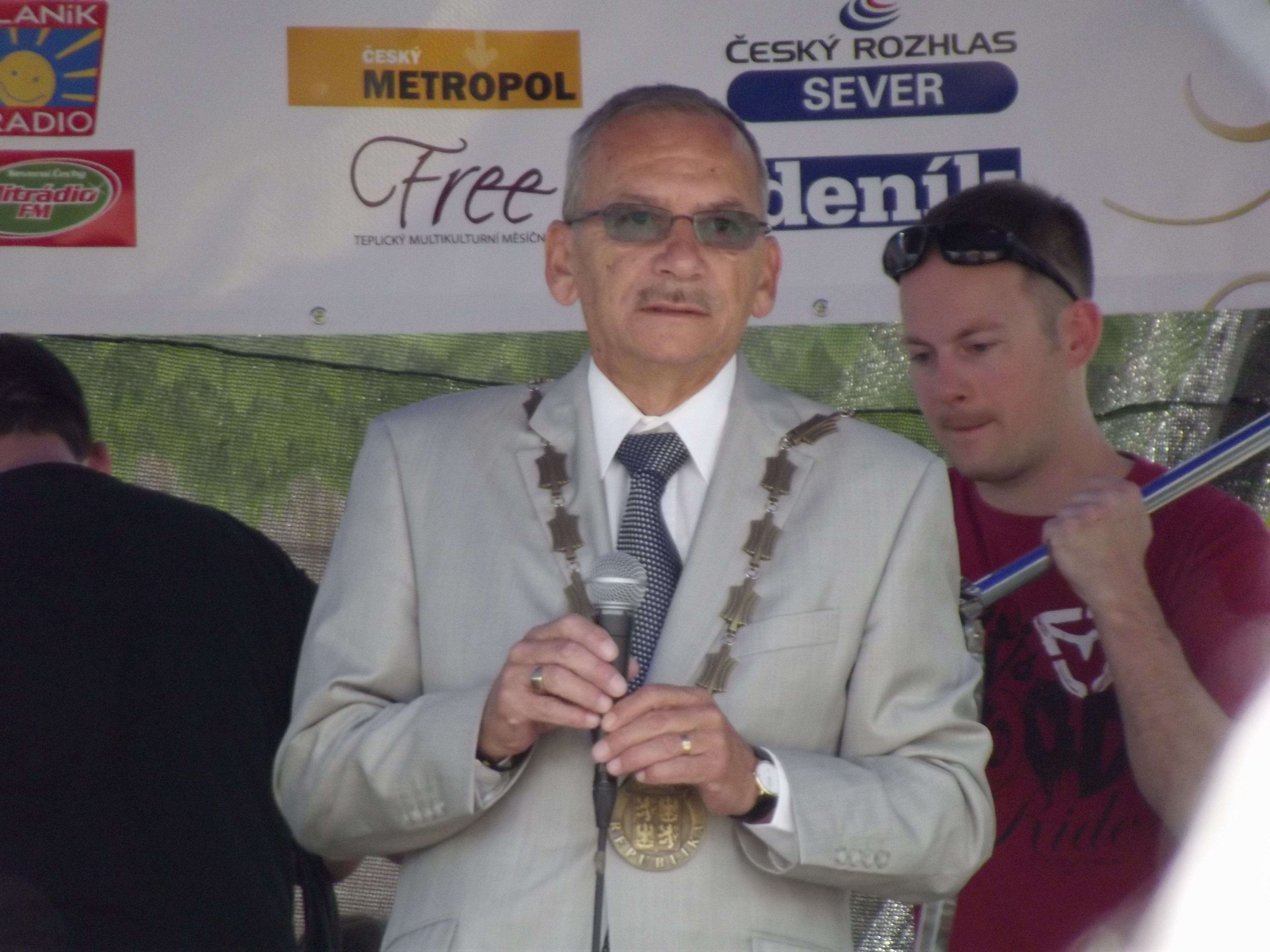 Jaroslav Kubera na 858. zahájení lázeňské sezóny v Teplicích